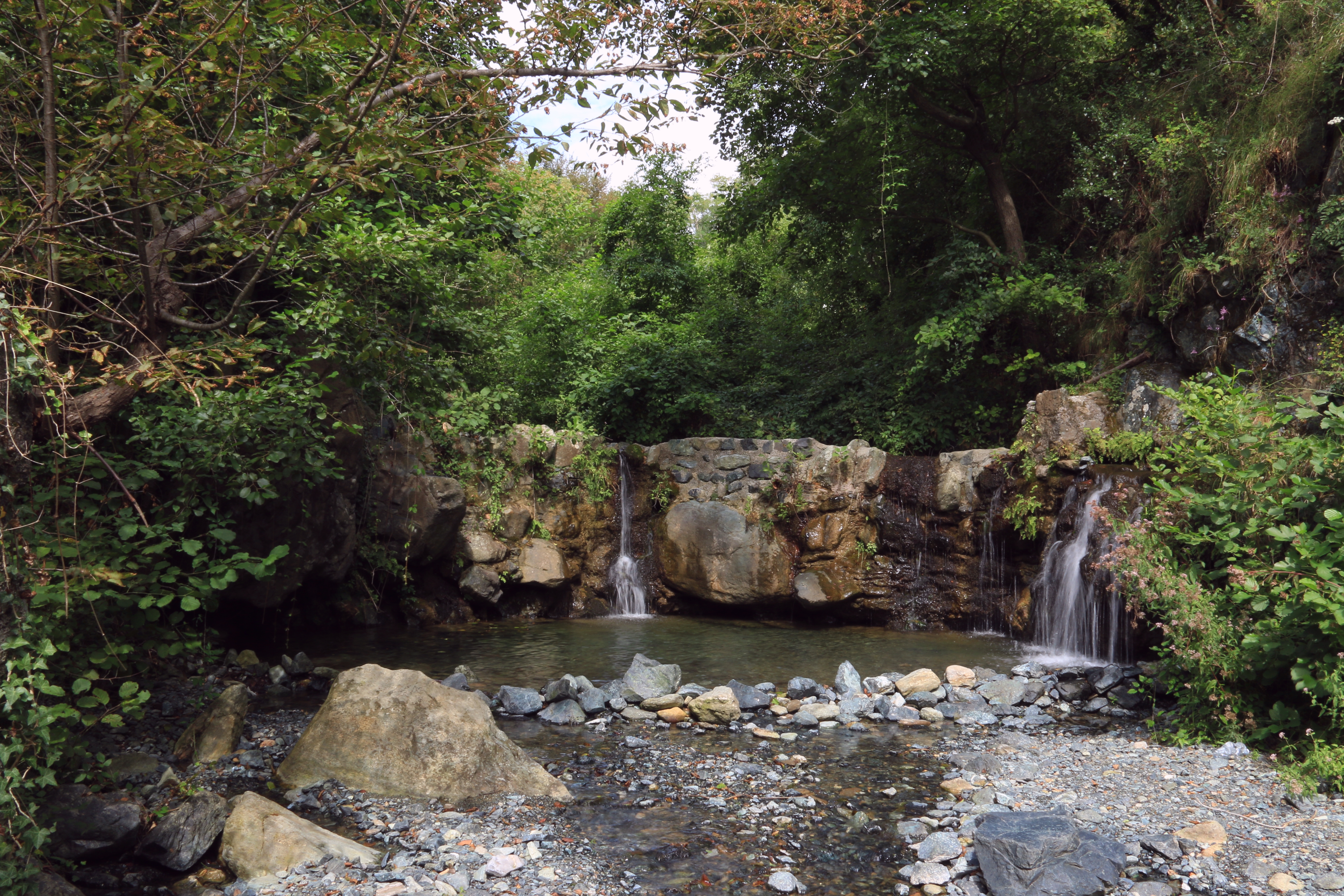 Cascata Bianchetta - Val Chiaravagna, Sestri Ponente, Genova, Liguria